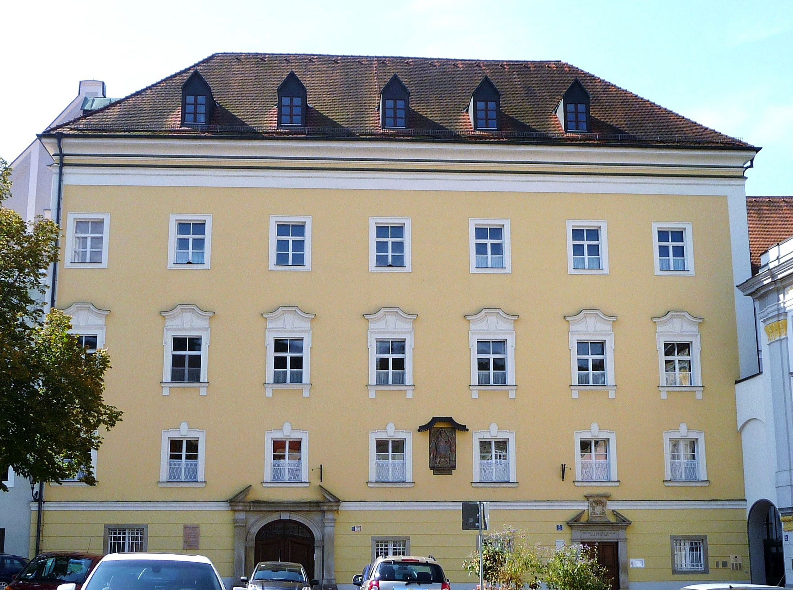 Das Priesterseminar St. Stephan in Passau